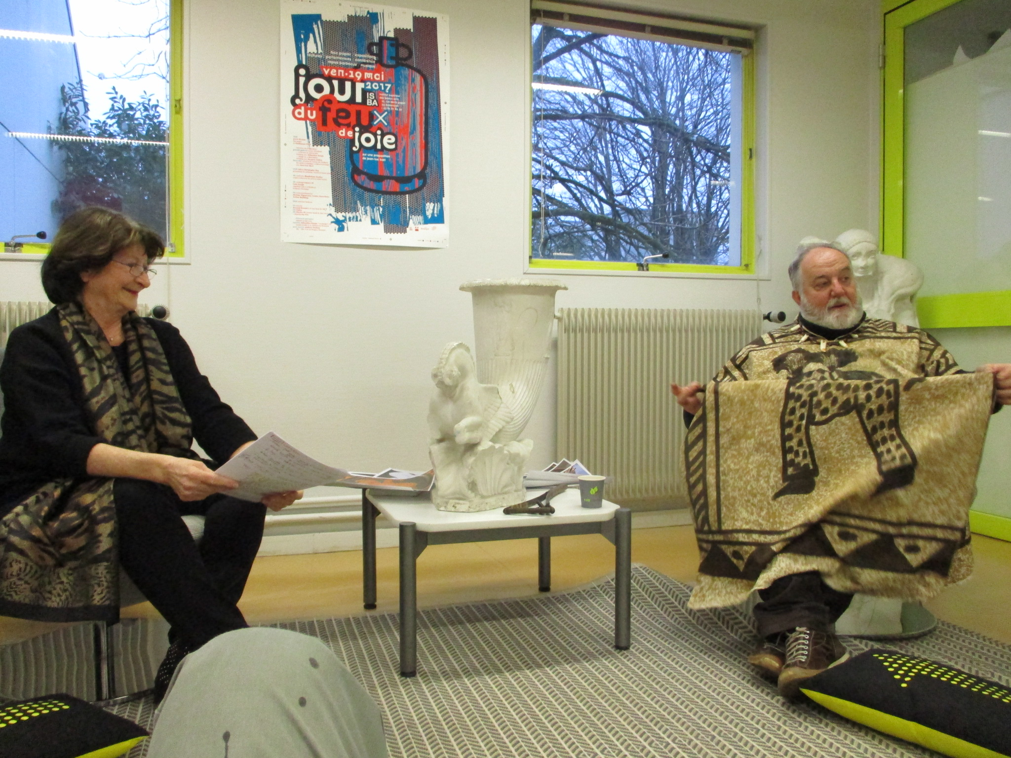 Institut supérieur des beaux-arts de Besançon Franche-Comté. Conférence d'Anne-Lise Vuillamer, et du directeur et professeur de l'école Laurent Devèze, sur la dualité / complémentarité, humain / animal, dans l'antiquité grecque